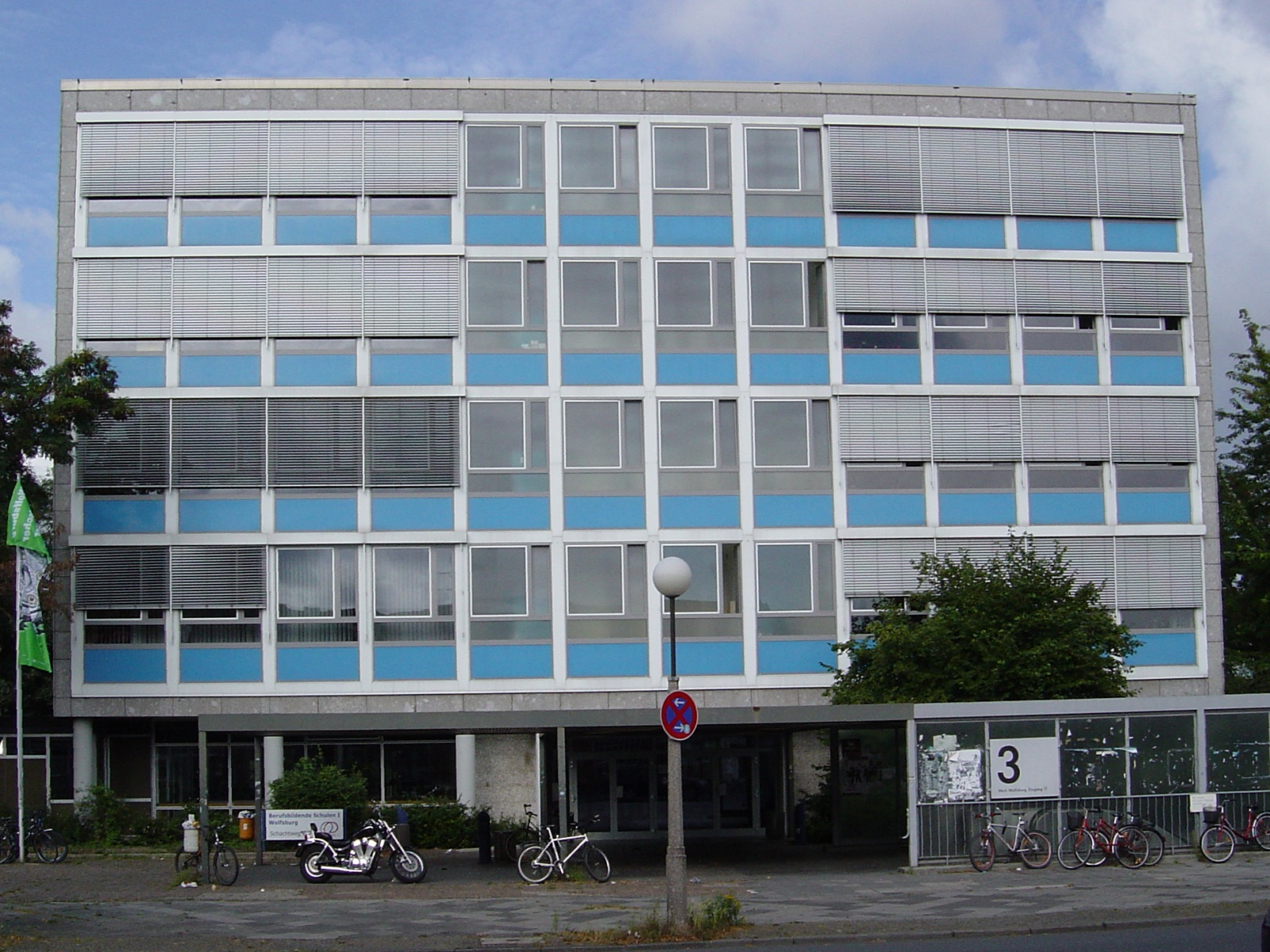 Carl-Hahn-Schule Berufsbildende Schulen (BBS) Wolfsburg für Wirtschaft, Verwaltung und Gesundheit